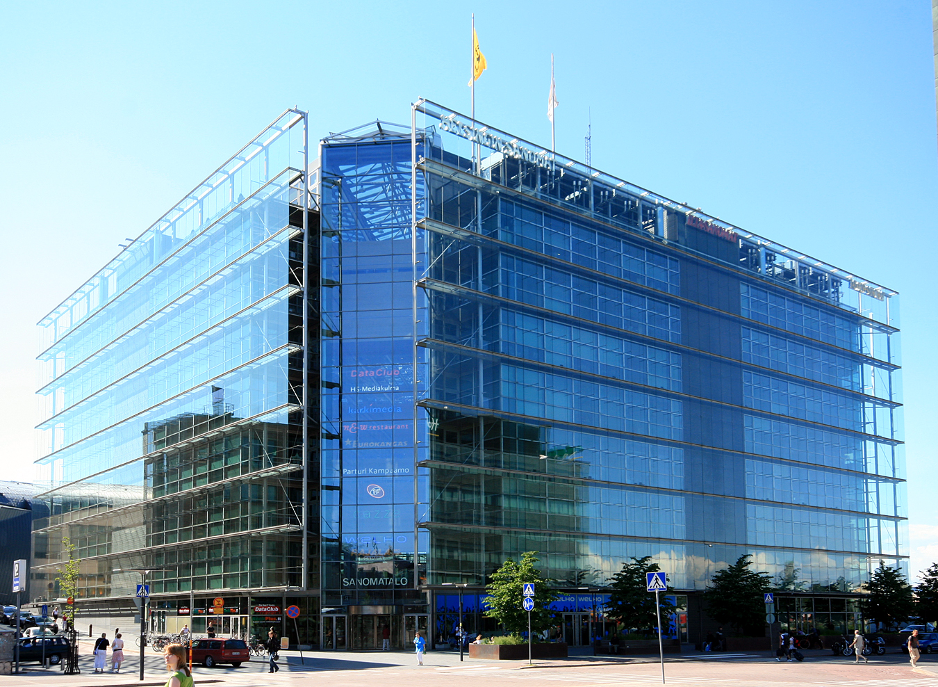 Sanomatalo, Helsinki. Arkkitehdit Jan Söderlund ja Antti-Matti Siikala. Rakennusvuosi: 1999.